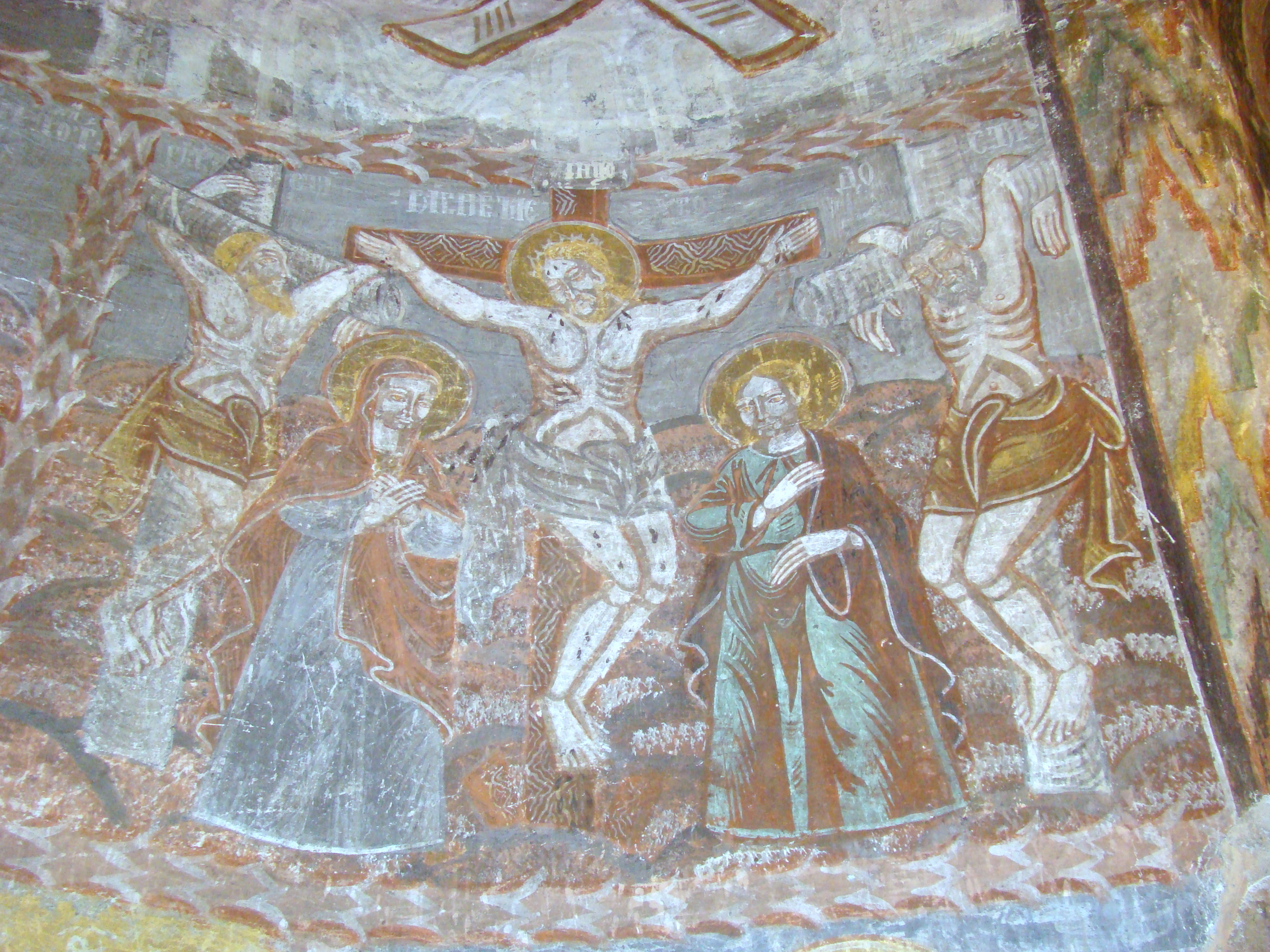 Biserica "Arhanghelul Mihail", sat GURASADA, județul Hunedoara